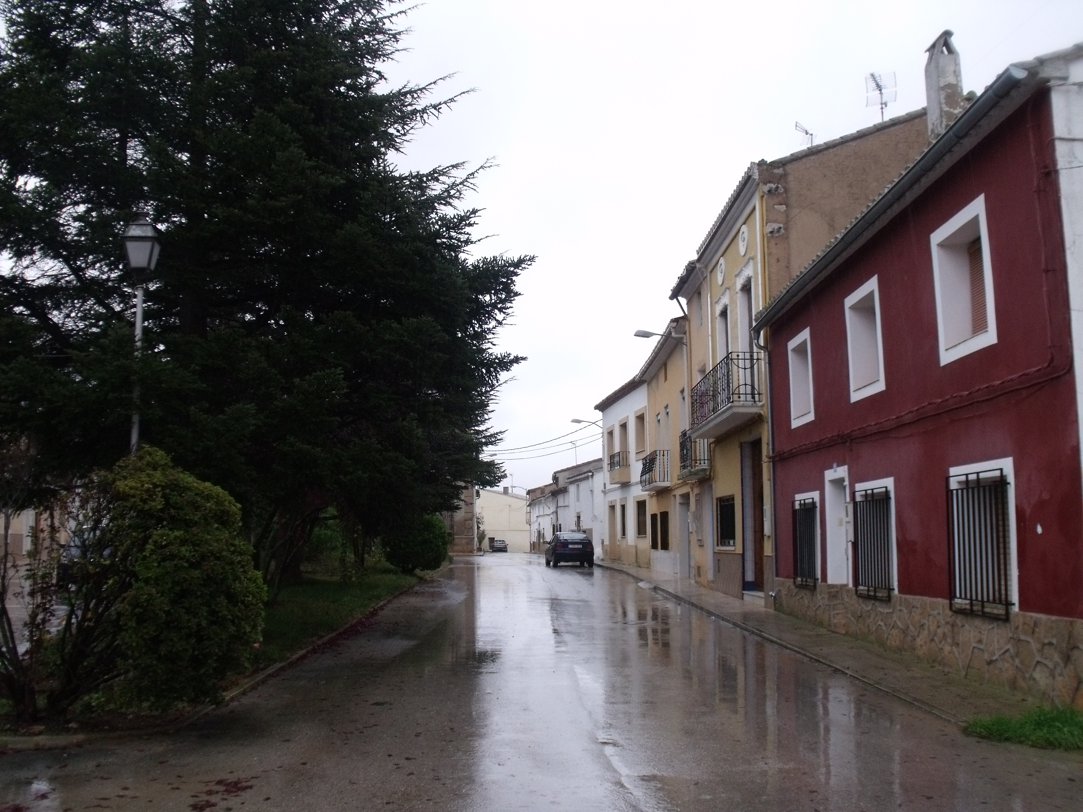 Calles del núcleo poblacional